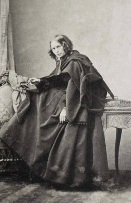 Графиня Вера Григорьевна Пален, ур. Чернышёва (1808—1880)